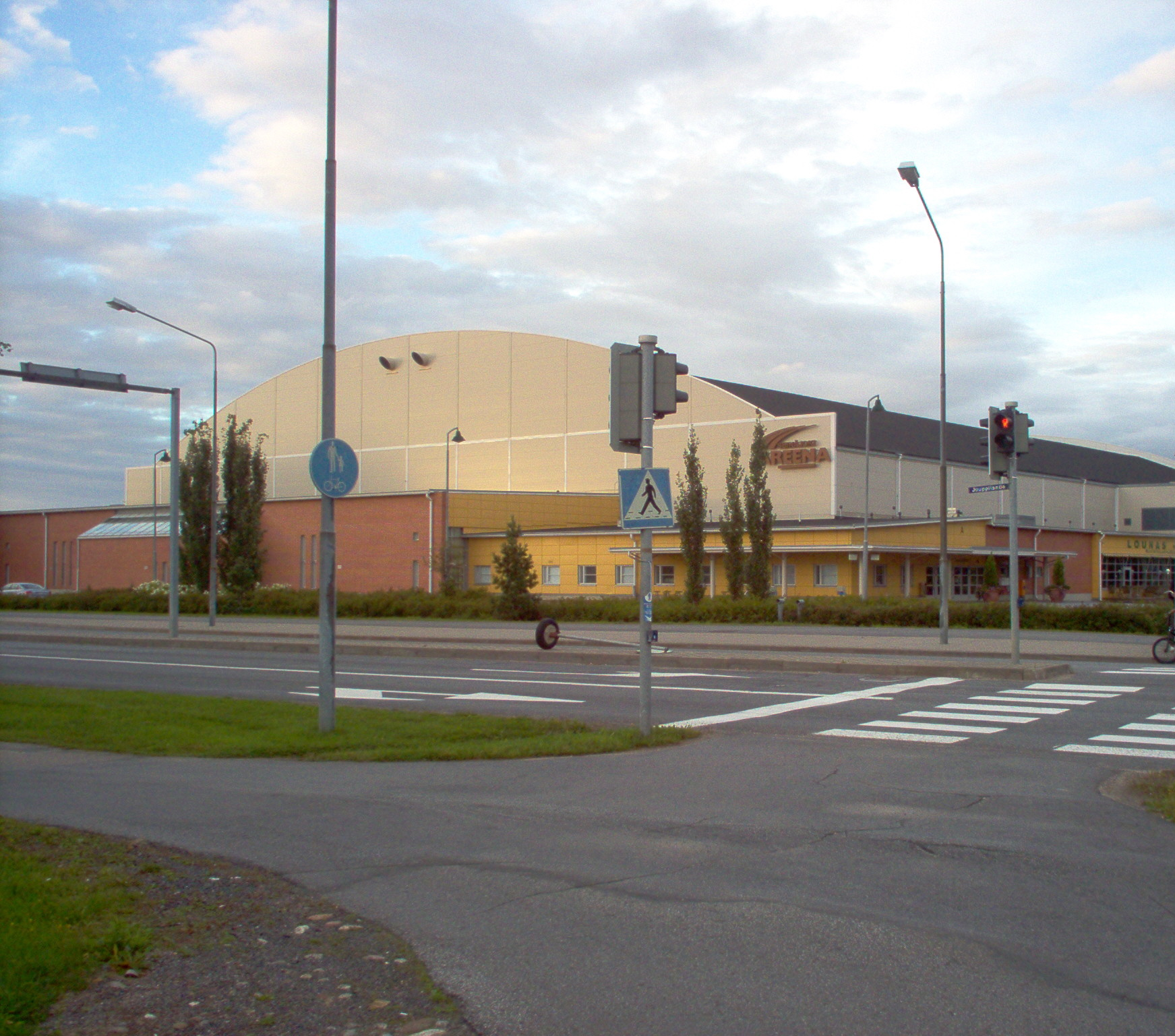 Seinäjoki Arena